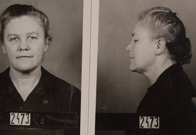 Vazební fotografie Antonie Kleinerová